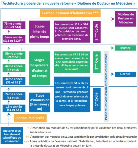 Réforme des études médicales au Maroc